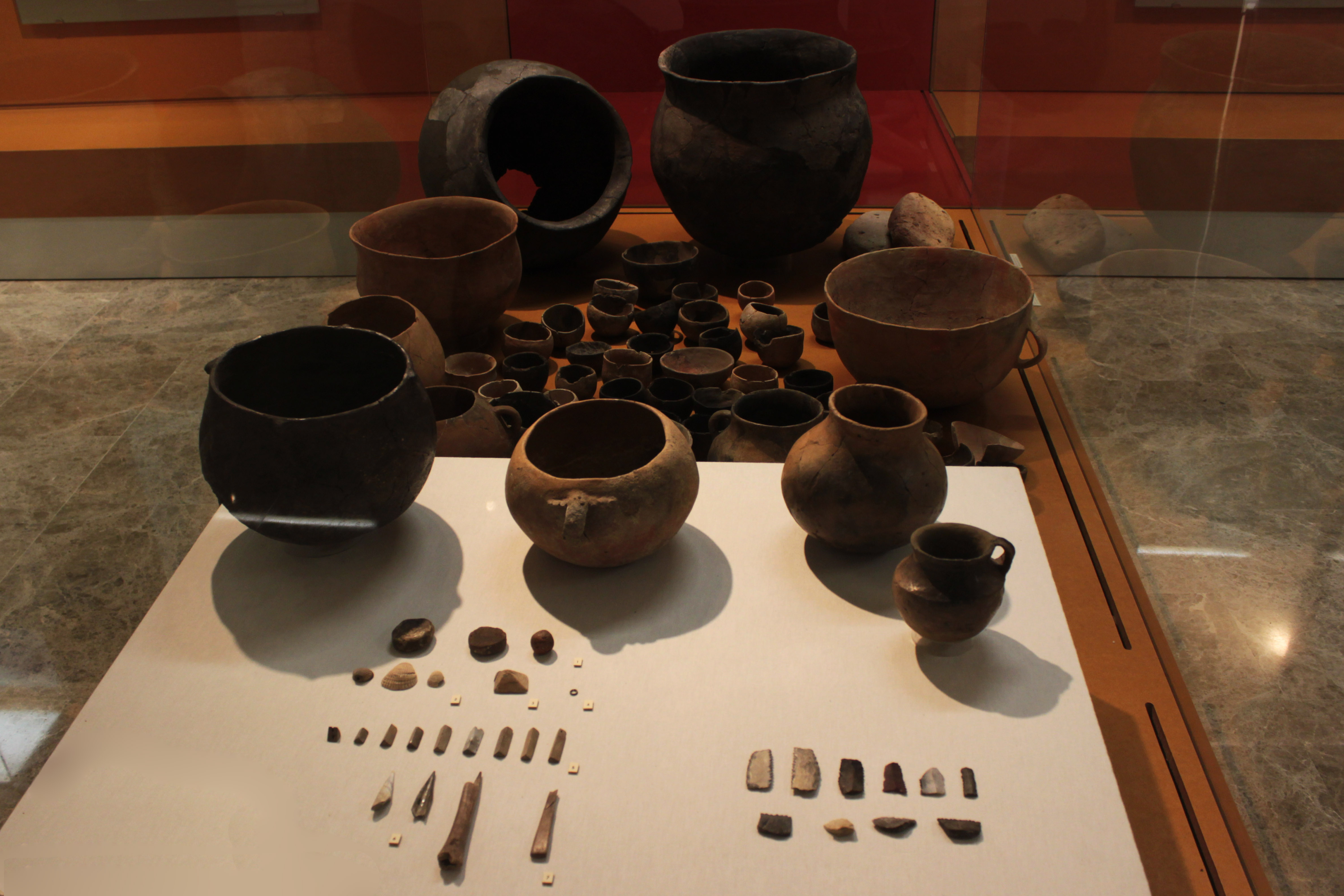 Cerámica doméstica de la Edad del Bronce de la Habitación I del yacimiento de la Lloma de Betxí (Paterna). Fondos del Museo de Prehistoria de Valencia, Comunidad valenciana, España.